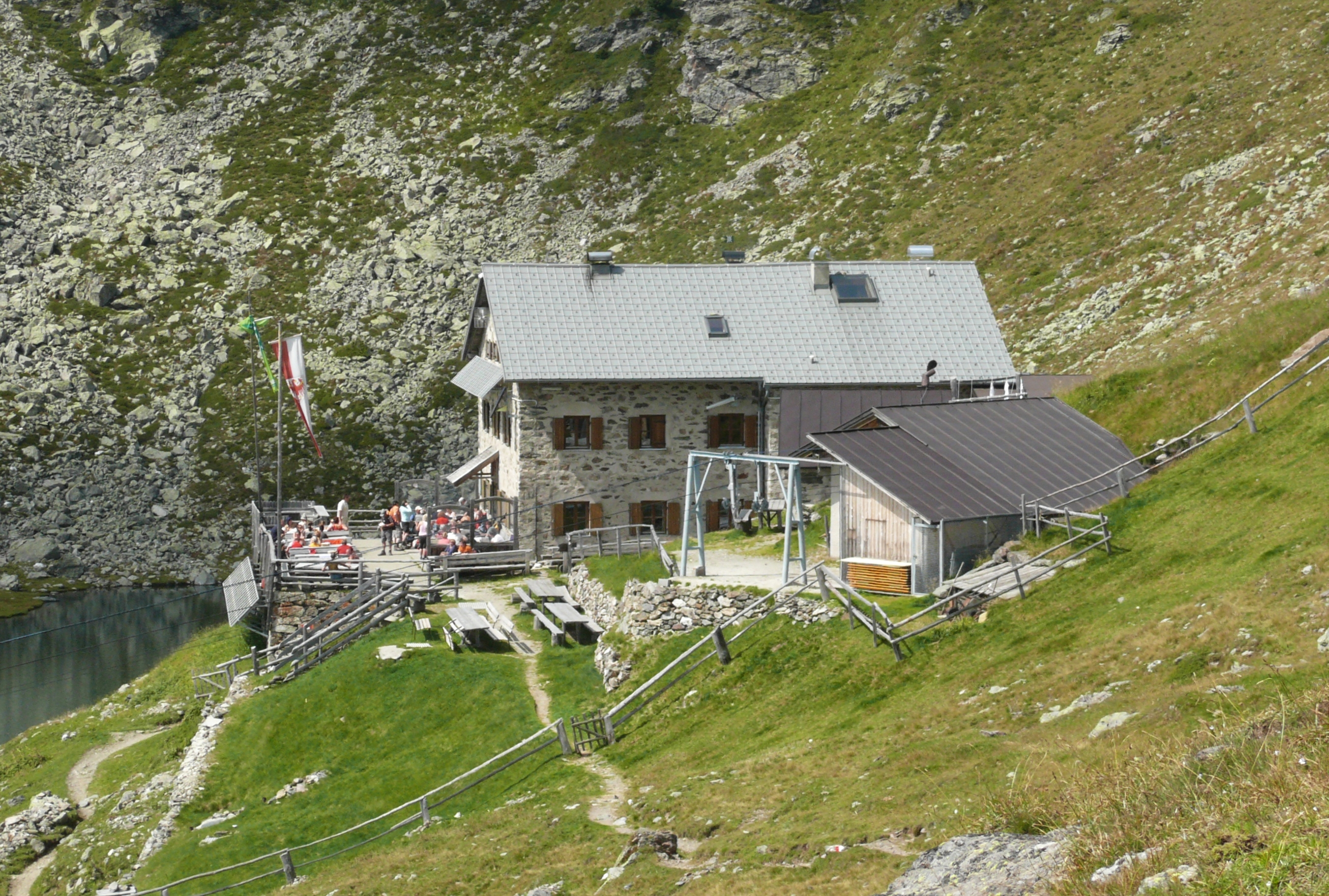 Radlseehütte (Rifugio Lago Rodella), Sarntaler Alpen, Italien